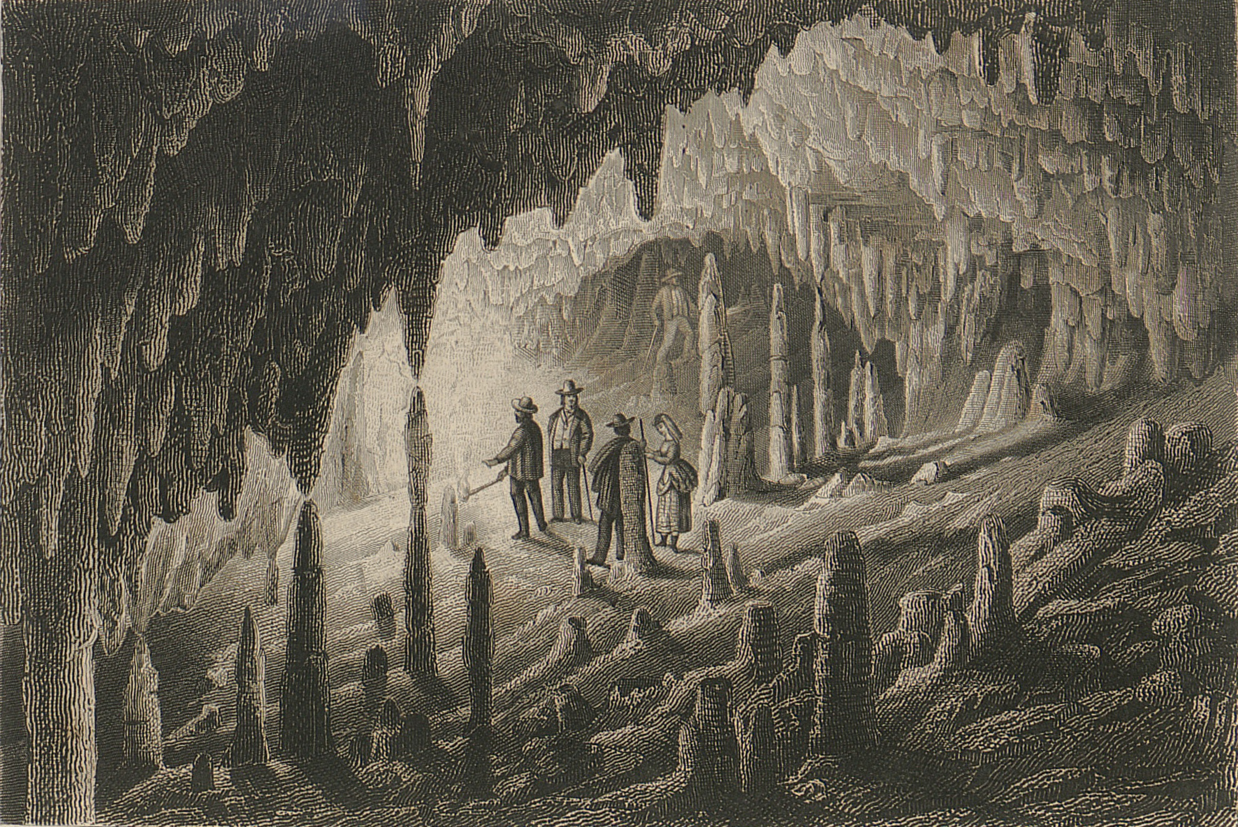 Höhle zu Sundwich